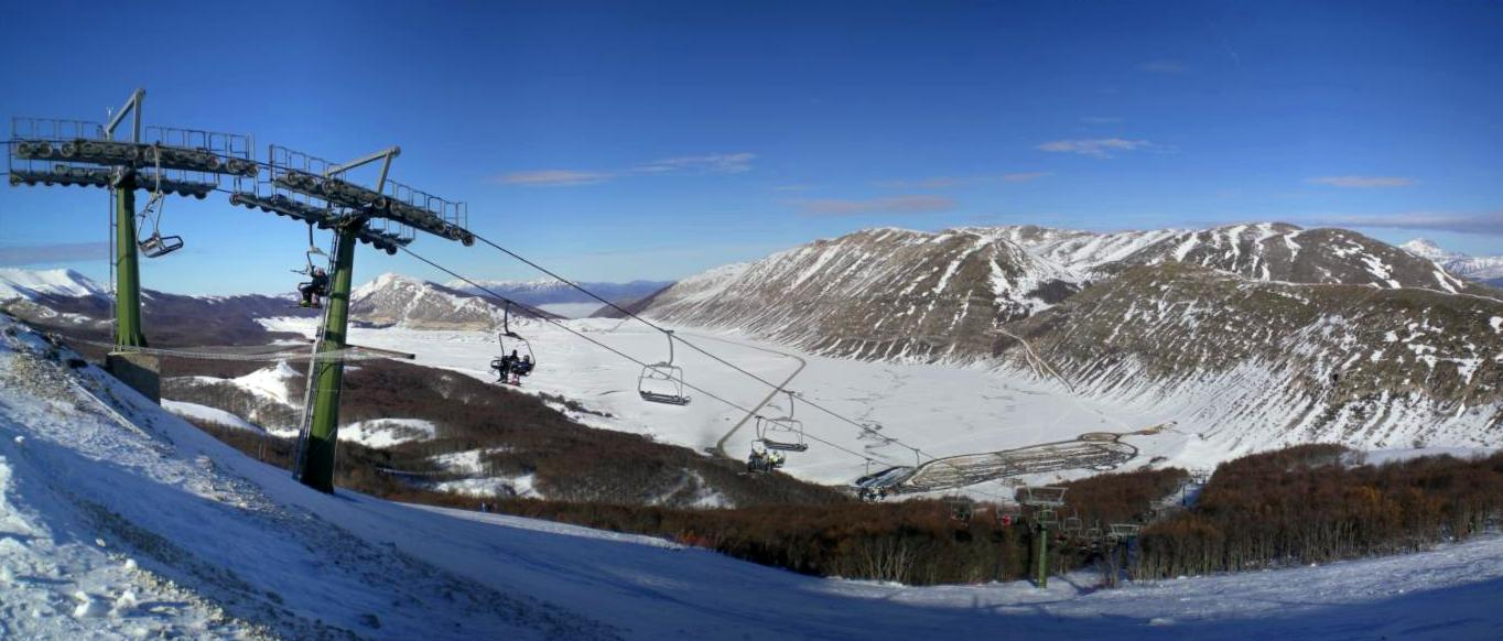 La piana di Campo Felice vista da Monte Cisterna. In primo piano gli impianti sciistici.